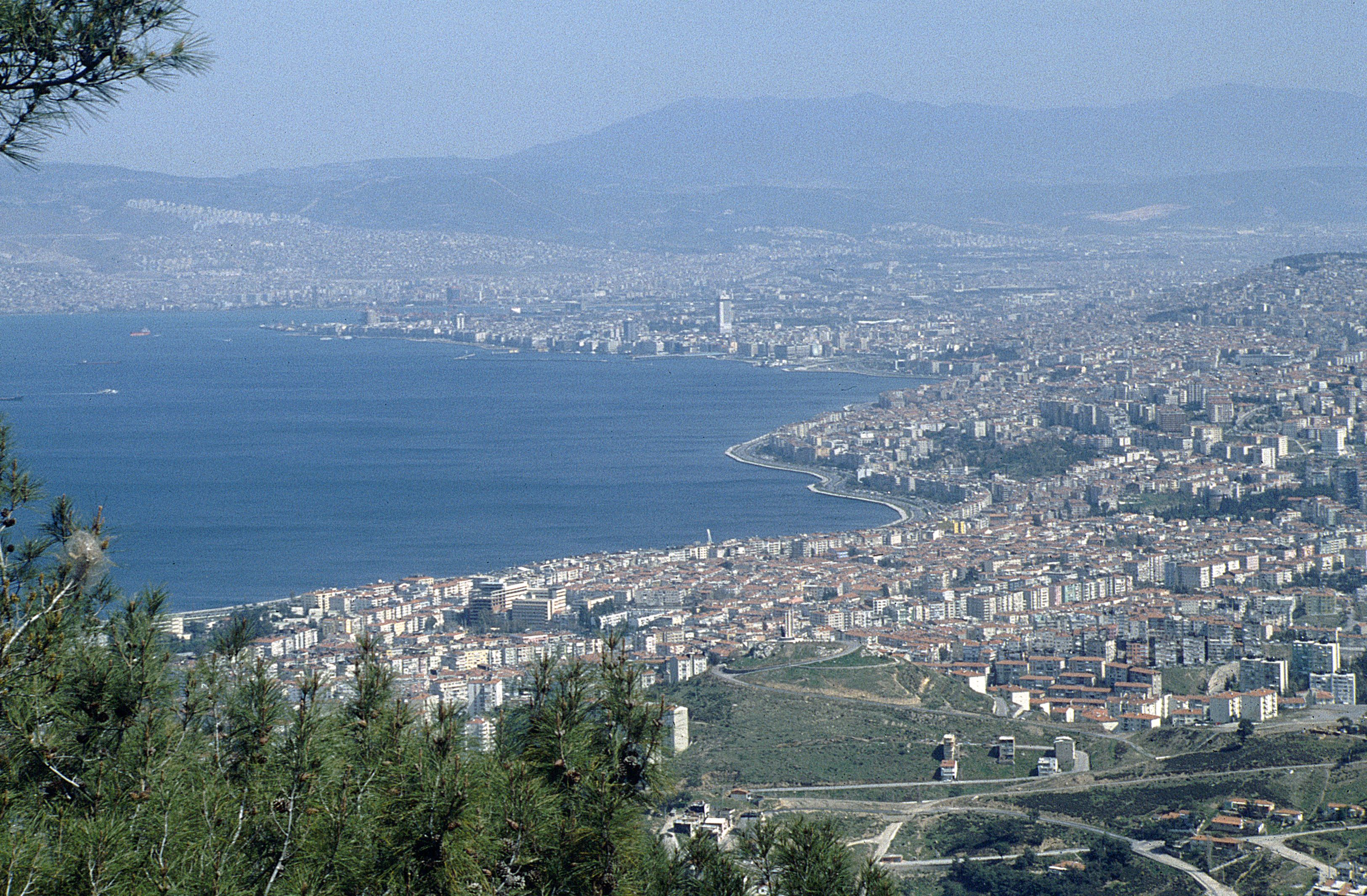 Blick auf die Bucht von İzmir